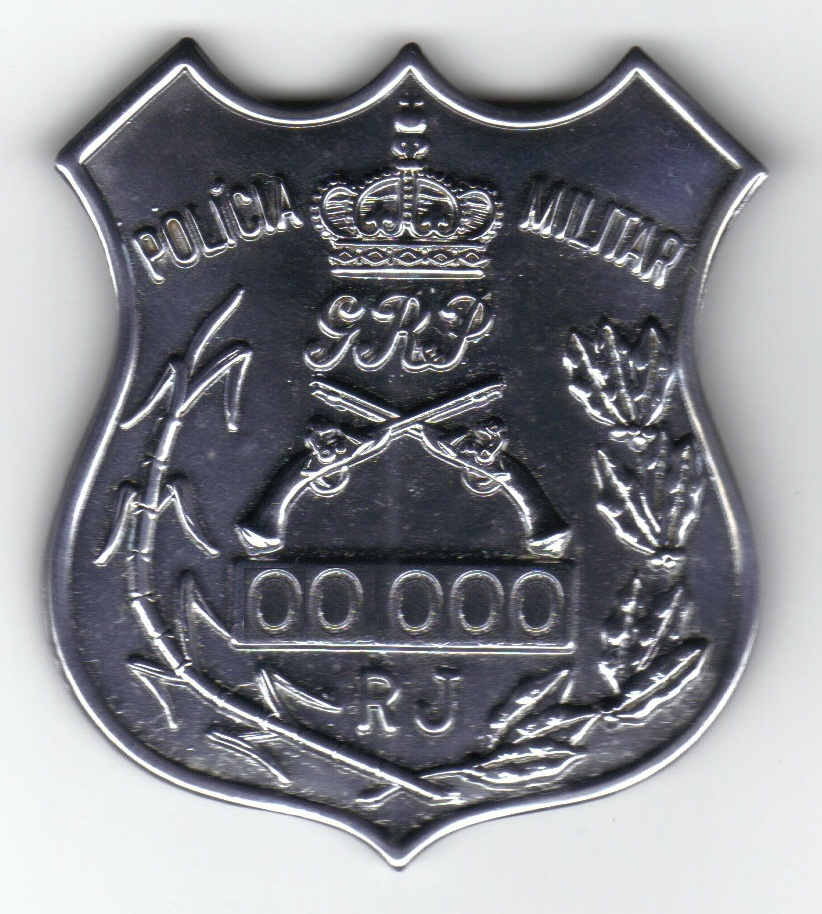 Distintivo de identificação utilizado por policiais militares do Estado do Rio de Janeiro nas décadas de 1980 e 1990.